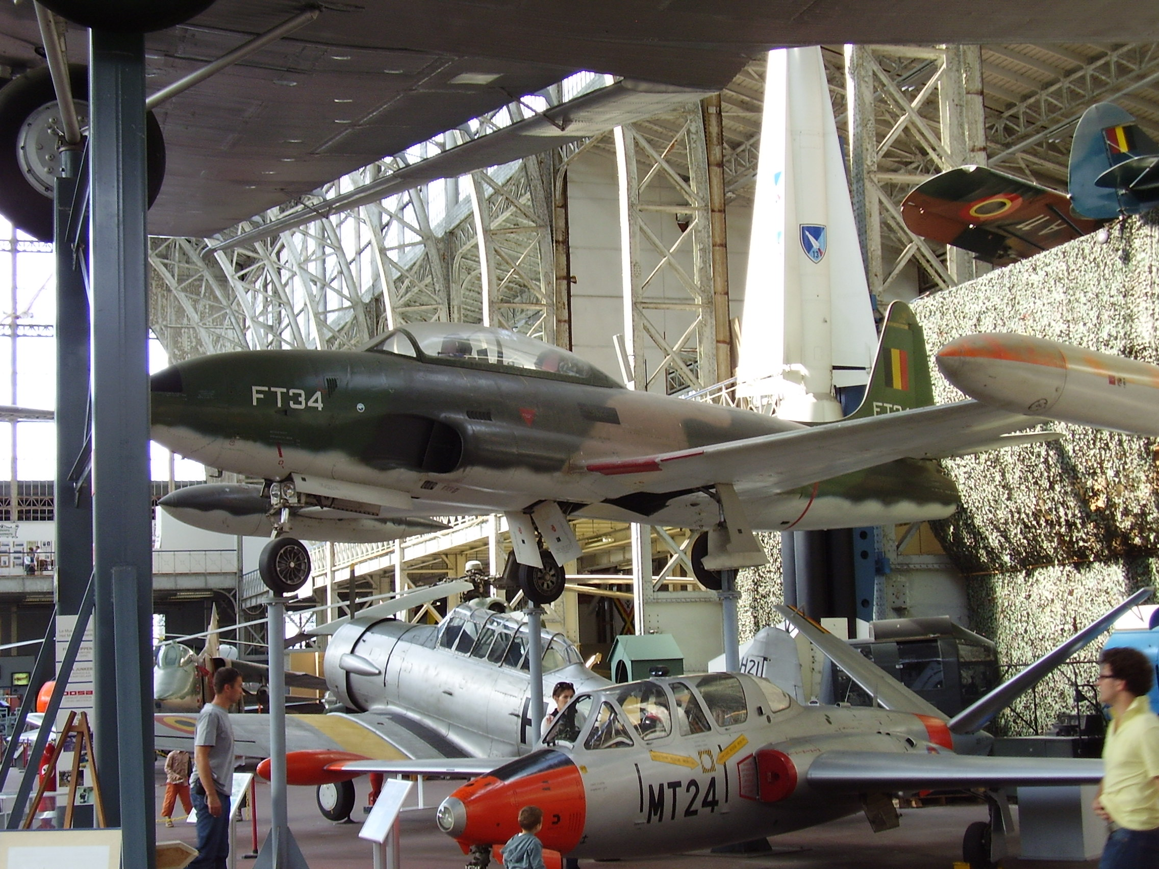 Royal Military Museum Brussels, Musée Royal de l'Armée, Koninklijk Museum van het Leger en de Krijgsgeschiedenis